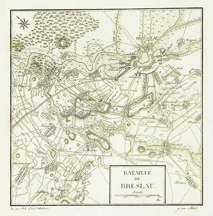 Схема битвы при Бреслау